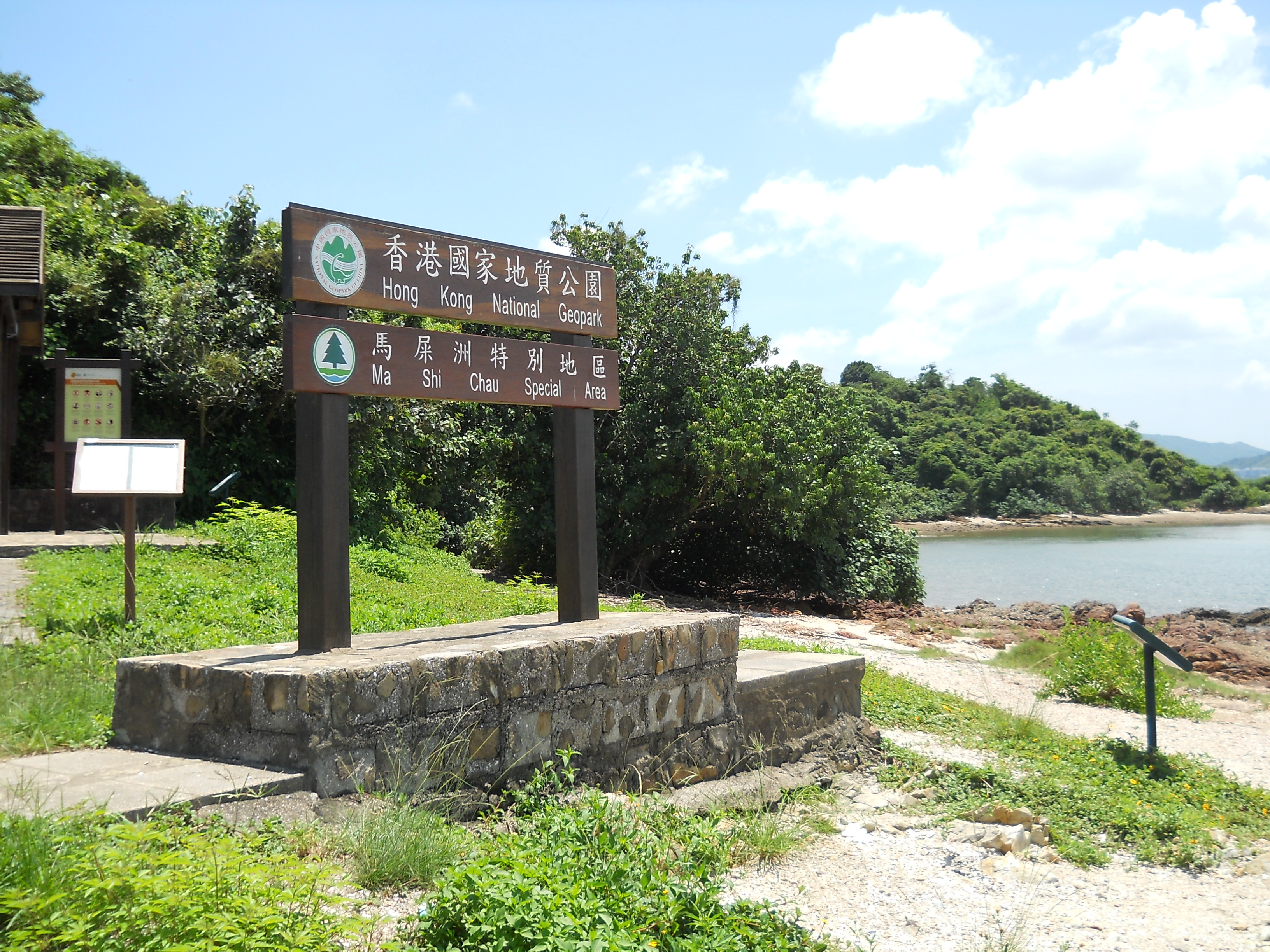 中文（香港）: 香港國家地質公園赤門景區--馬屎洲